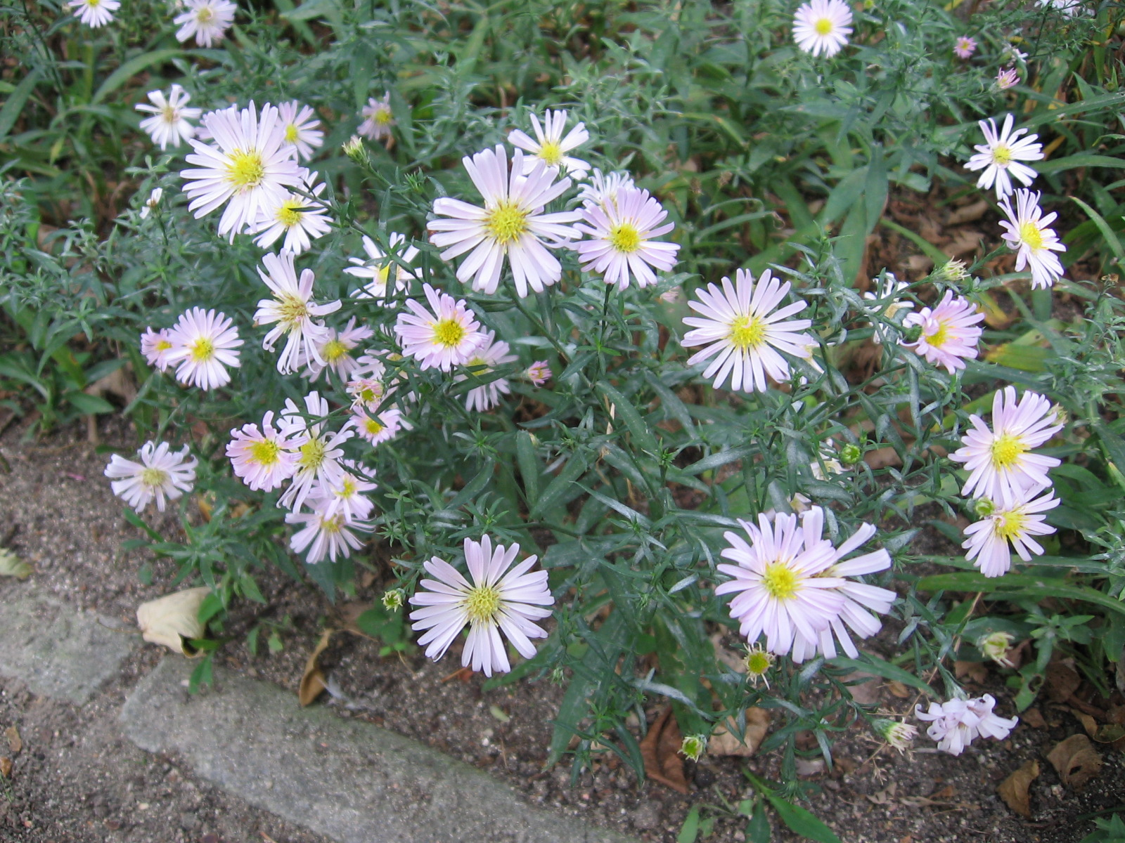 Aster x dumosus. Foto tomada en el Real Jardín Botánico de Madrid.